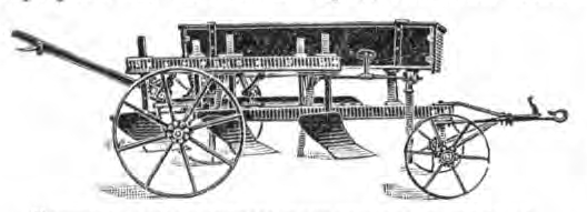 Буккер